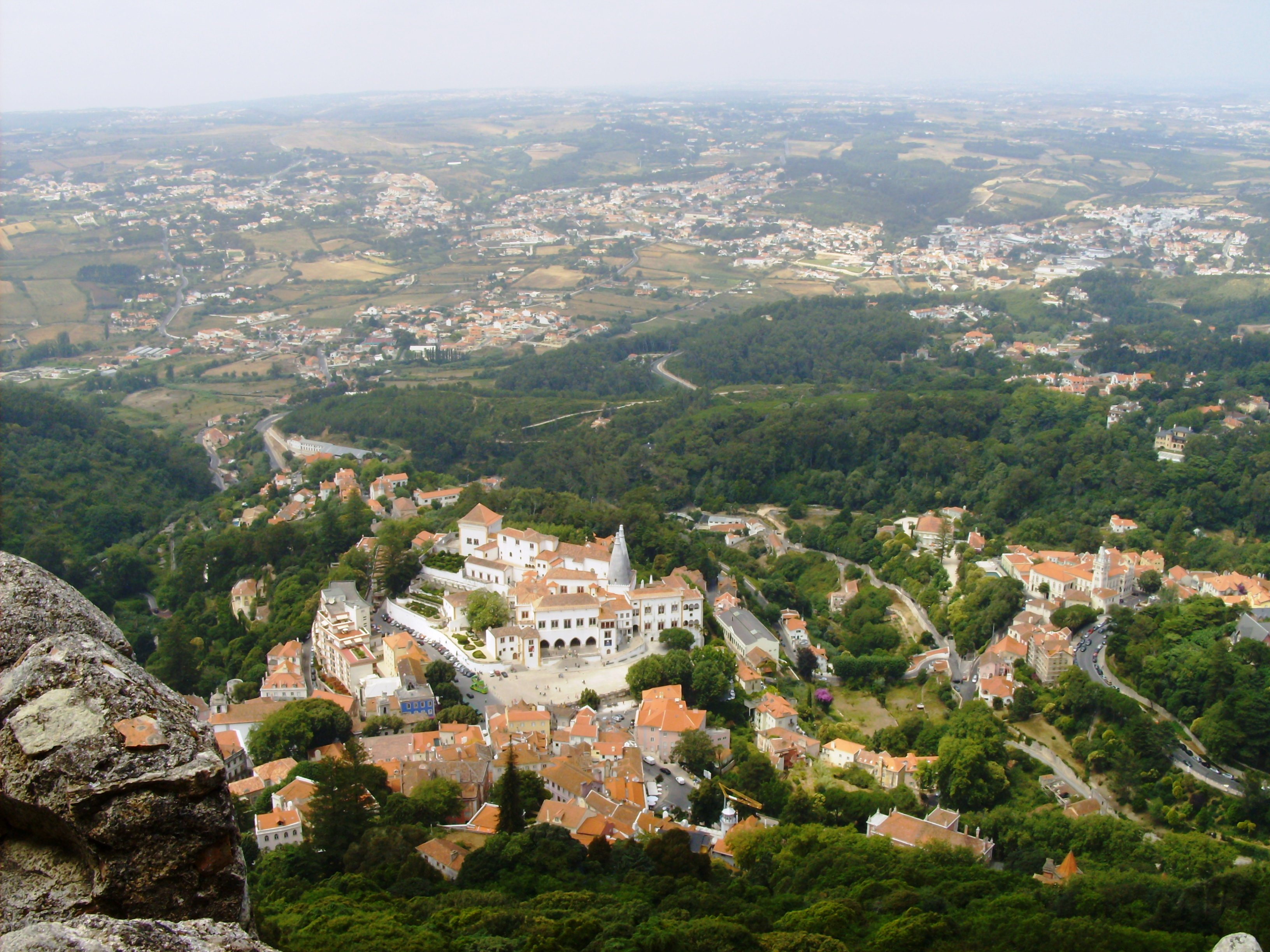 Palácio Nacional de Sintra, Portugal: vista a partir do Castelo de Sintra.